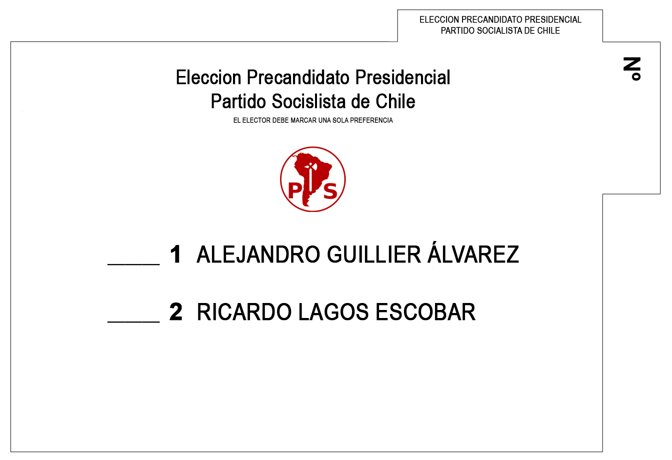 Facsímil del voto utilizado en la consulta interna del Comité Central del Partido Socialista de Chile en abril de 2017 para definir a su precandidato presidencial.